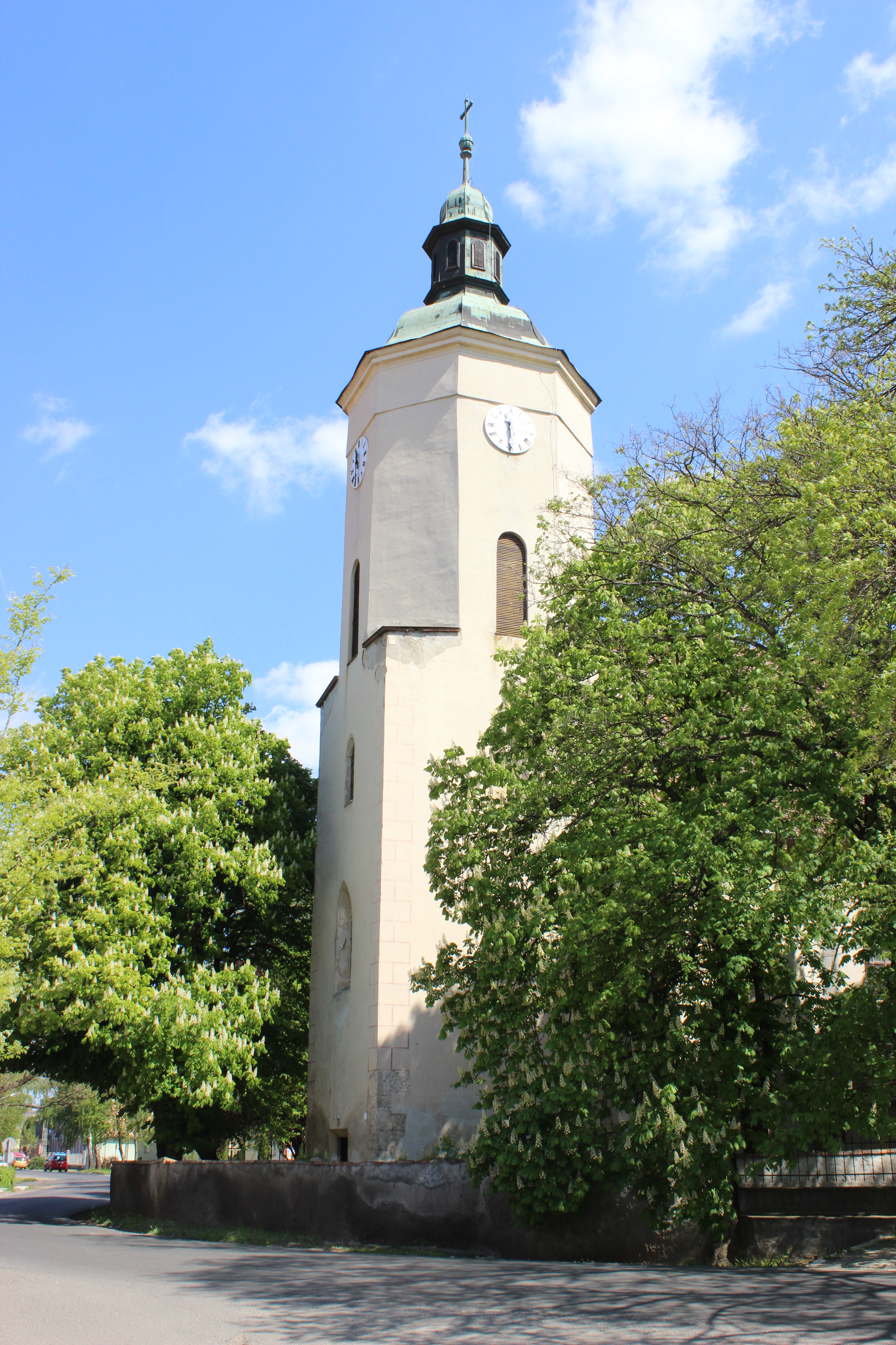 3881 Abaújszántó Béke út 31.